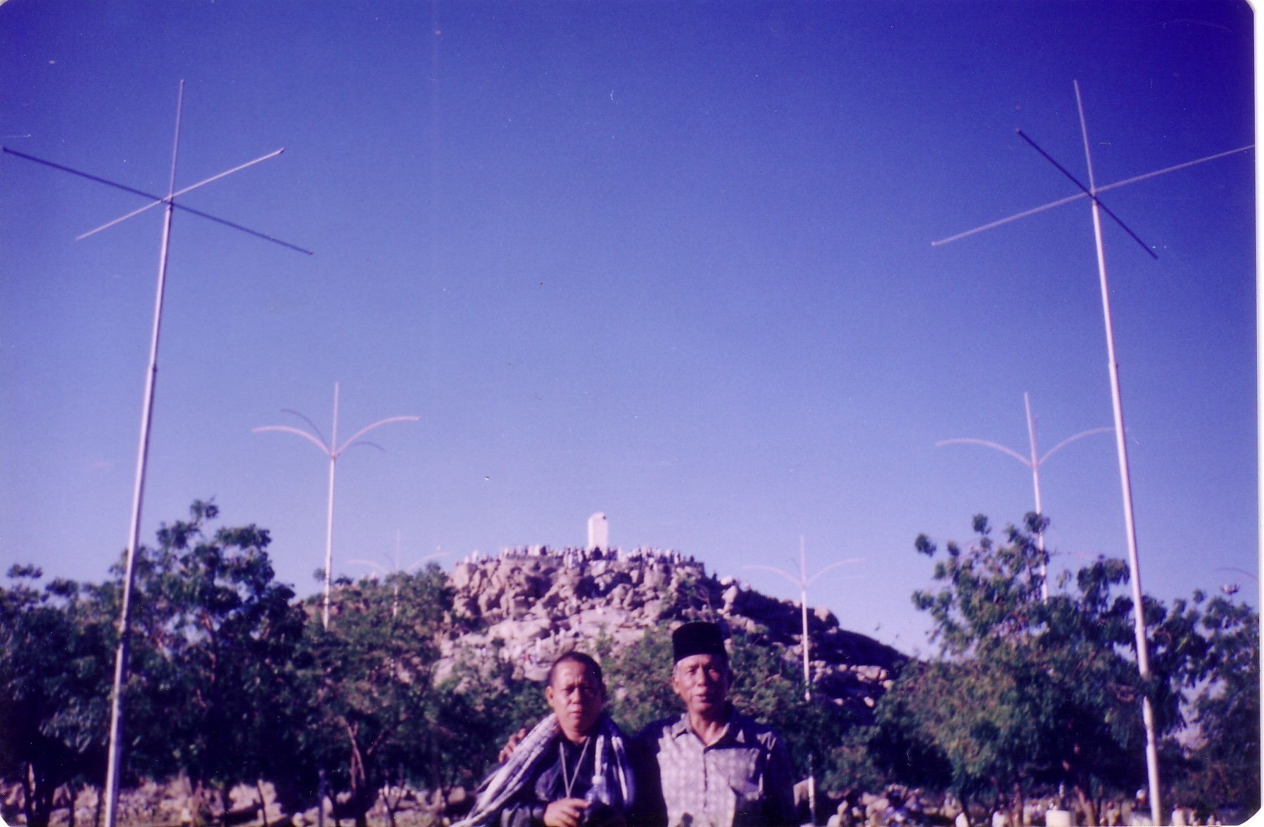 Mount Arafat (Jabal ‘Arafāt).